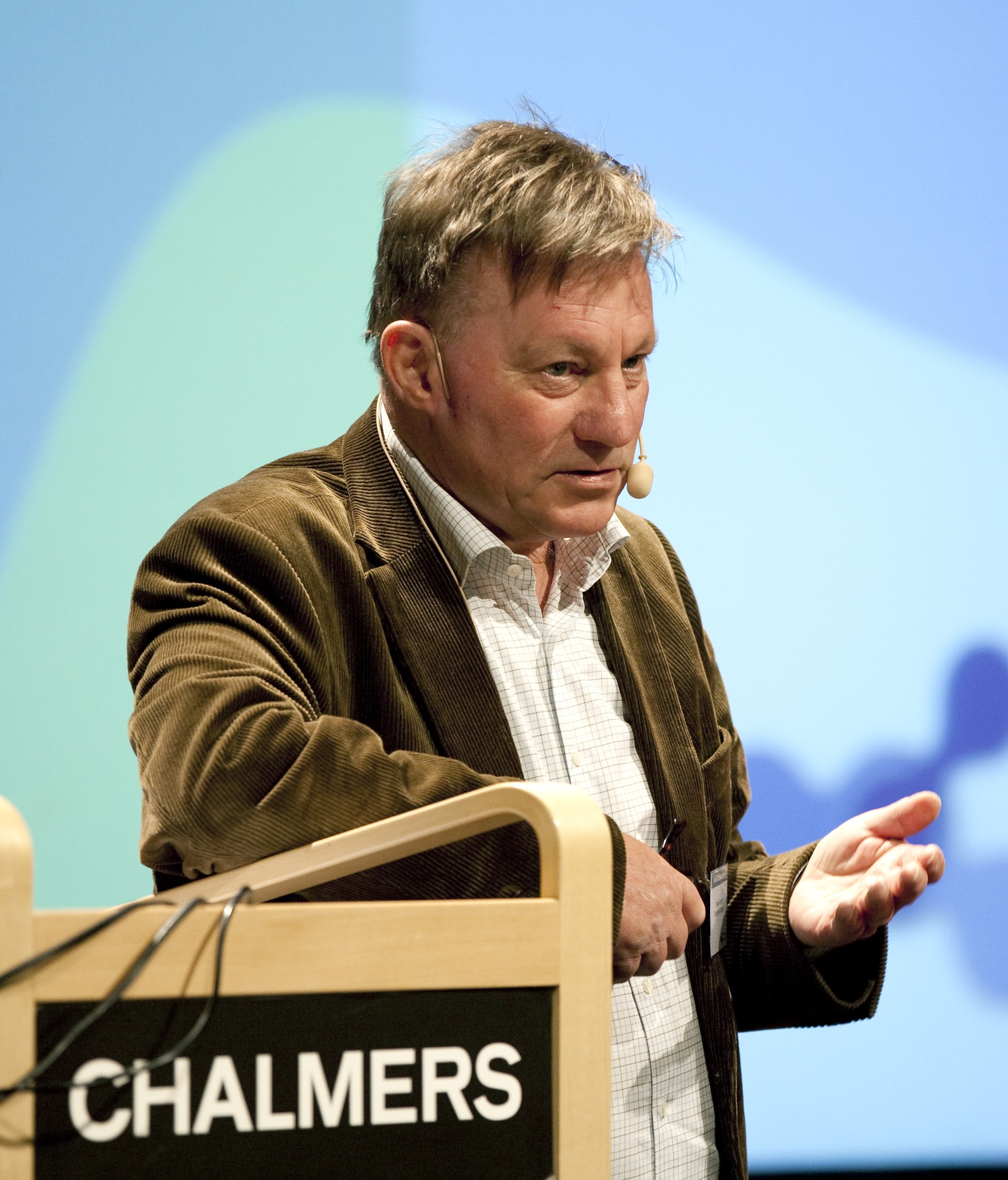 Advokaten Claes Borgström besöker Johanneberg Science Park i Göteborg under seminariet ”Socialt ansvarstagande 2.0”.